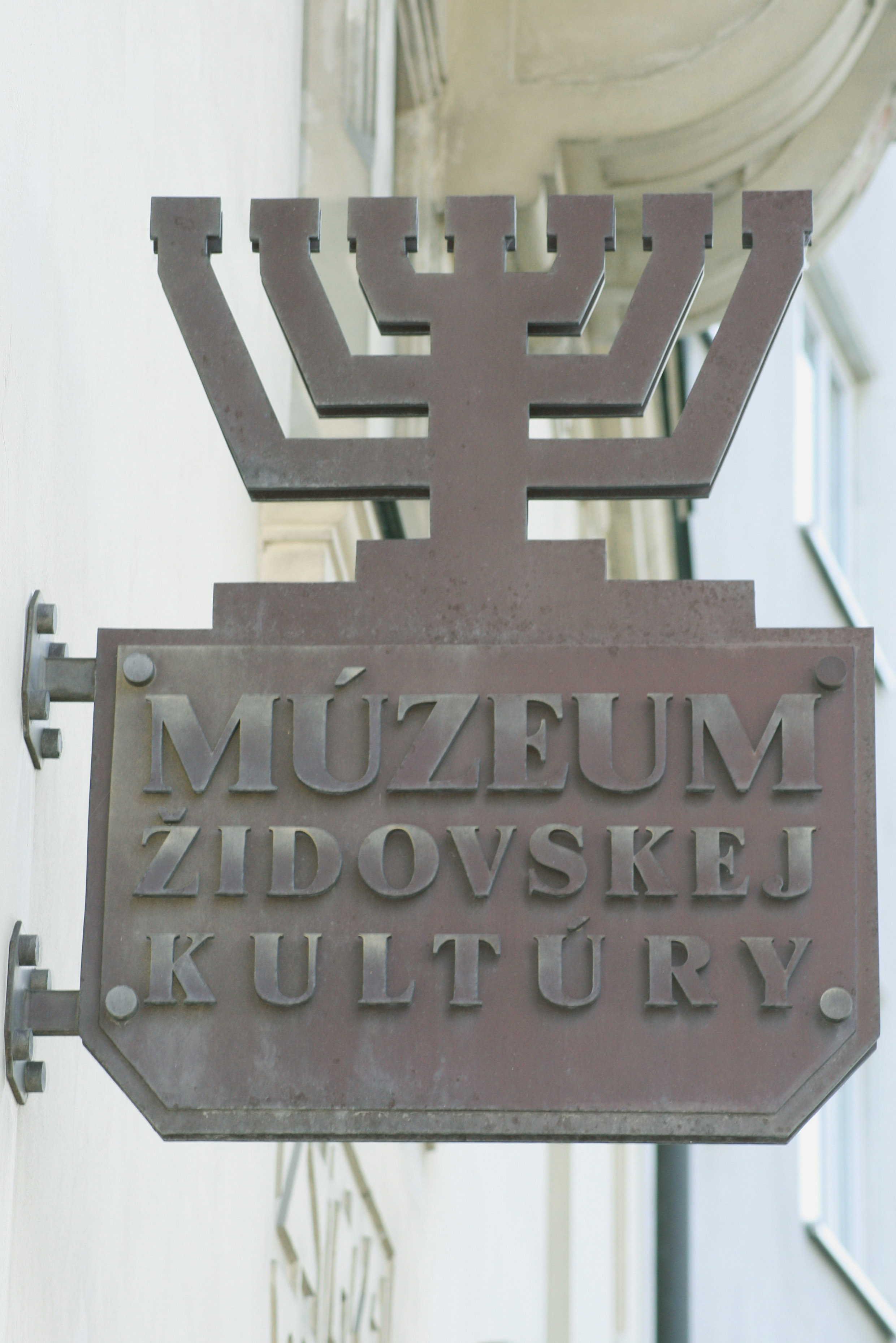 Informačná tabuľa upozorňuje na existenciu Židovského múzea na Židovskej ulici v Bratislave